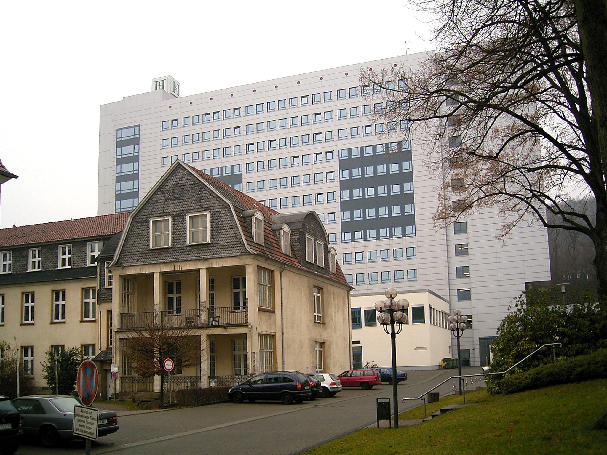 Wuppertal-Barmen, Helios Klinikum